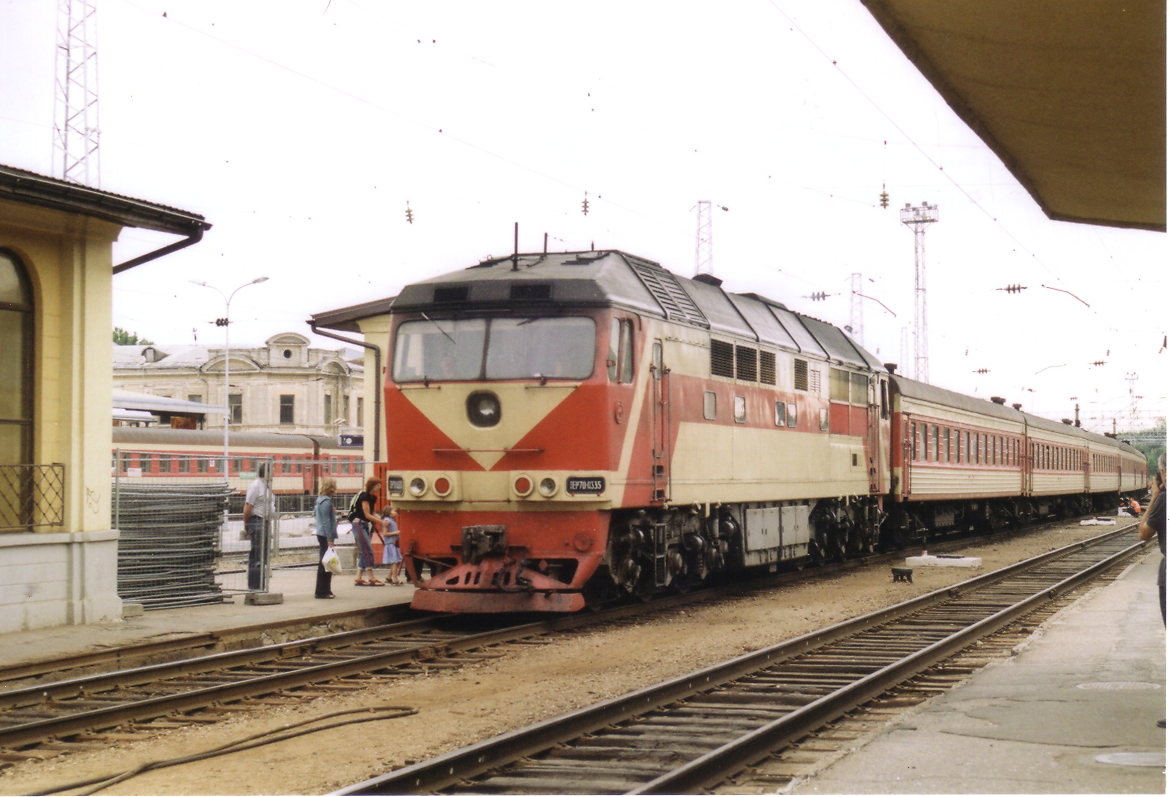 TEP70 in Vilnius, No TEP70-0335 none